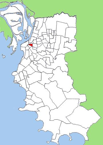 Bom Fim (em verde escuro), bairro da cidade brasileira de Porto Alegre